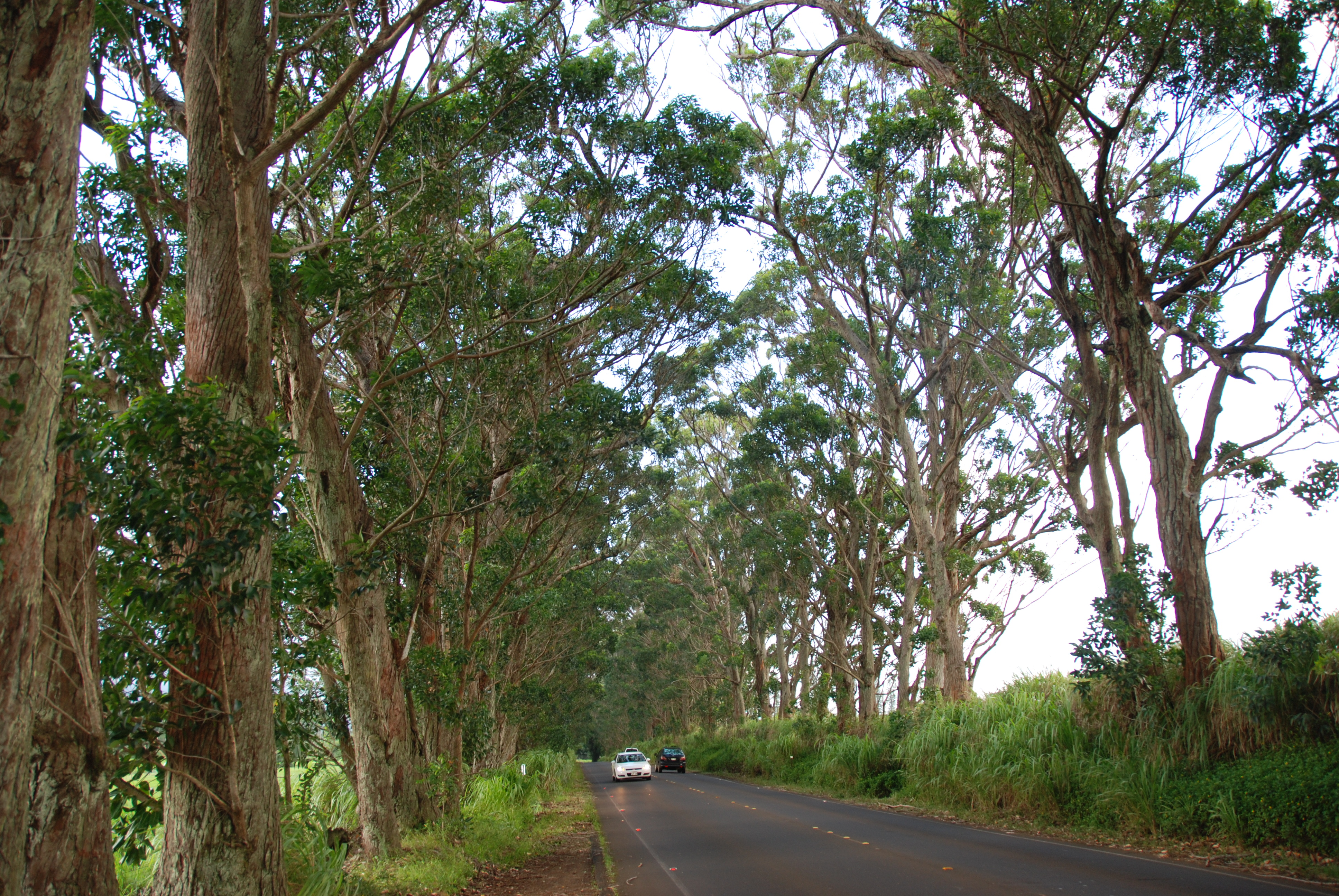 Tree Tunnel